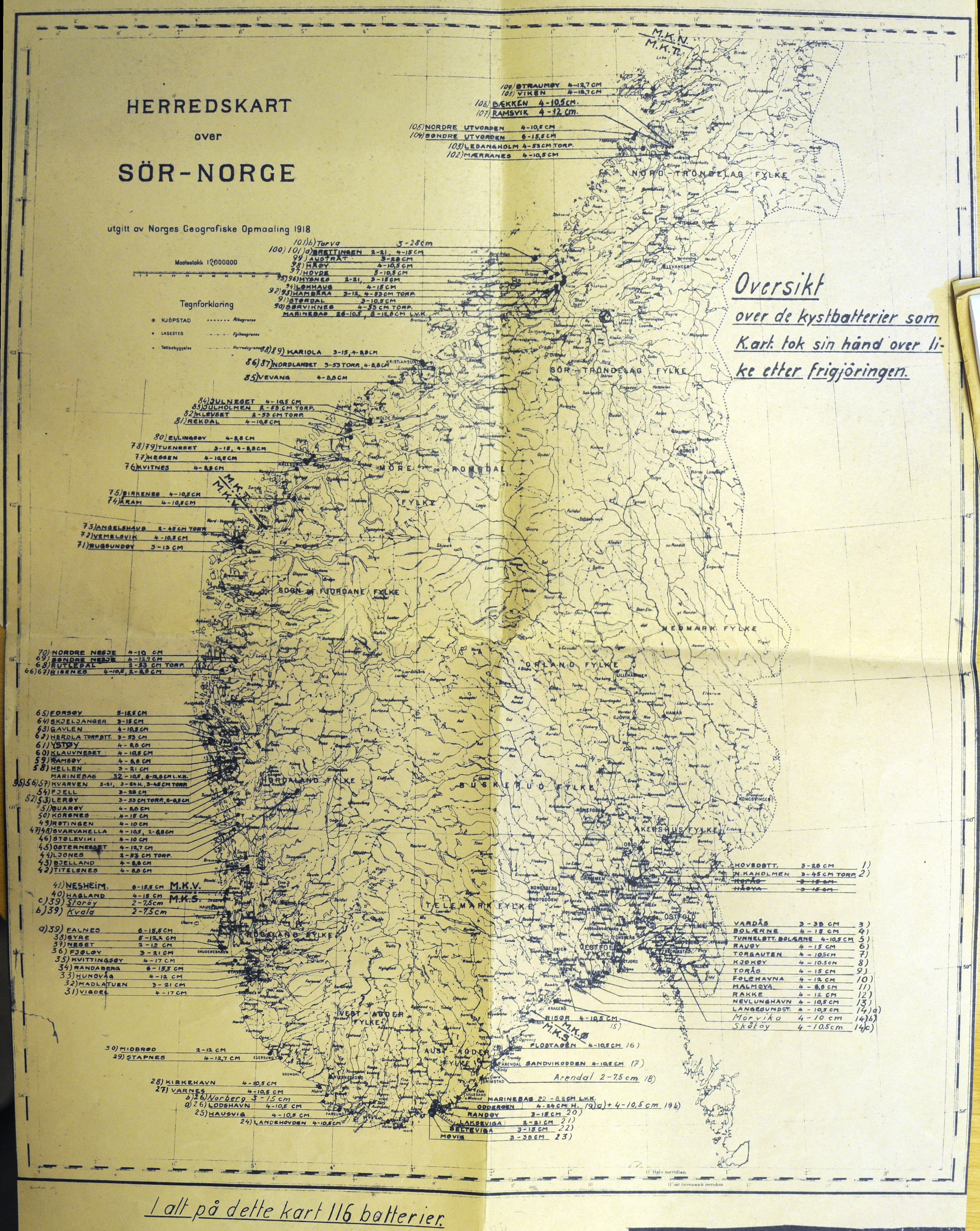 Oversikt over de kystbatterier som k.art tok sin hånd over like etter frigjøringen